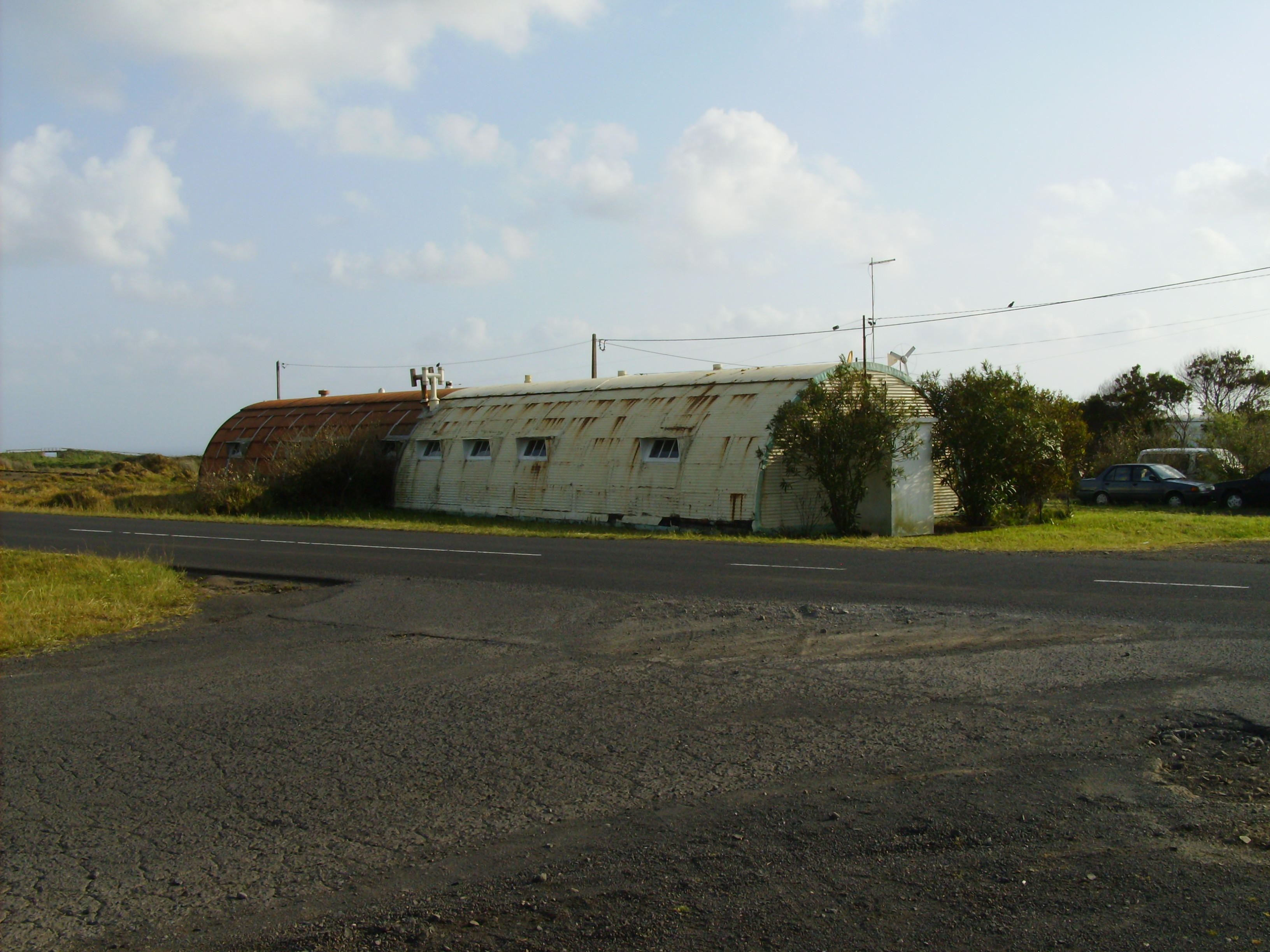 Quonset hut na Ilha de Santa Maria (Açores), Portugal.